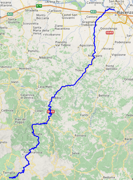 carte réalisée sur umap This map may be incomplete, and may contain errors. Don't rely solely on it for navigation.